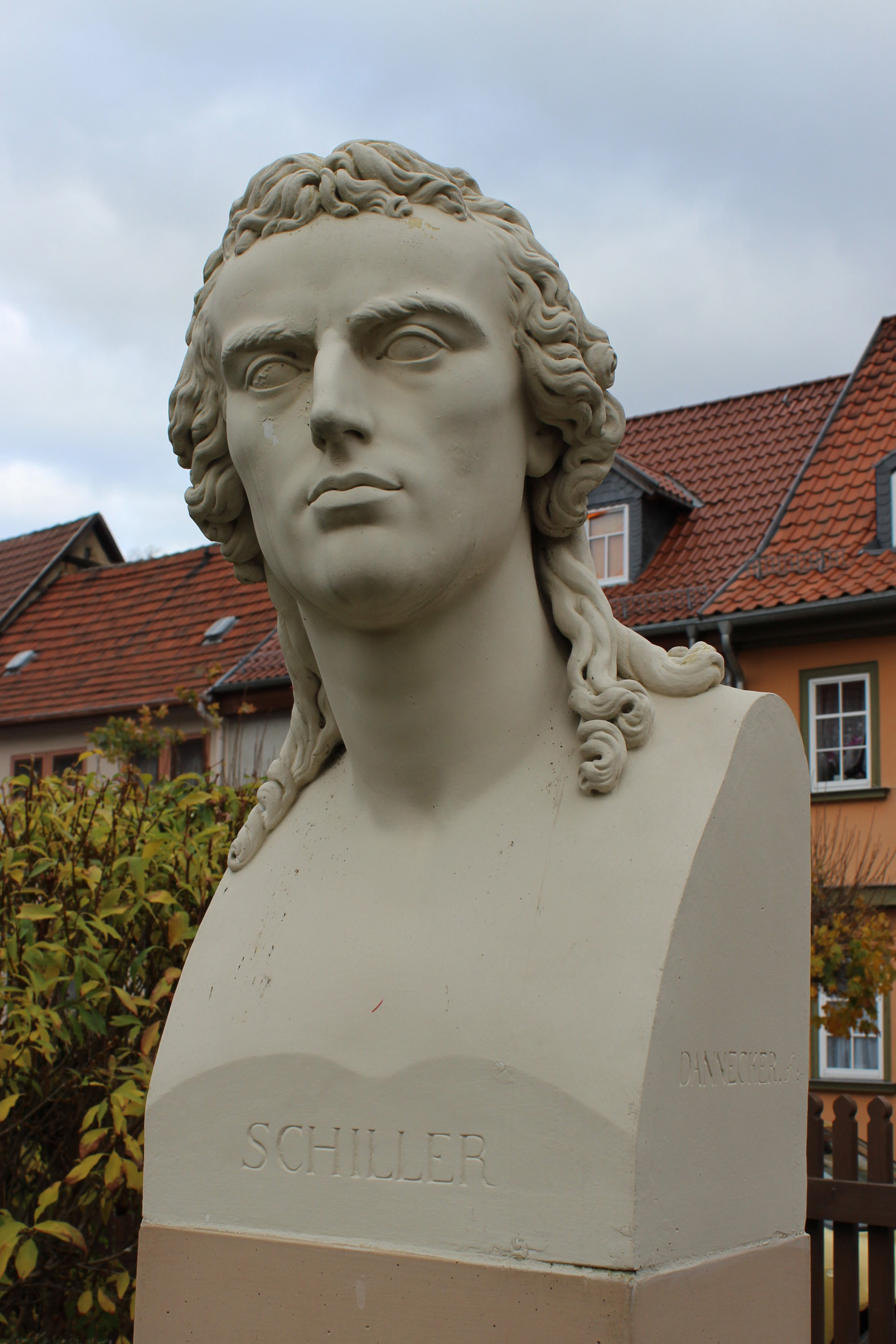 Büste von Friedrich Schiller, Nachbildung nach Dannecker im Garten des Schillerhauses Rudolstadt